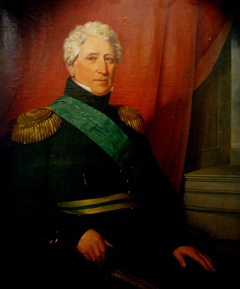 Israel af Ström